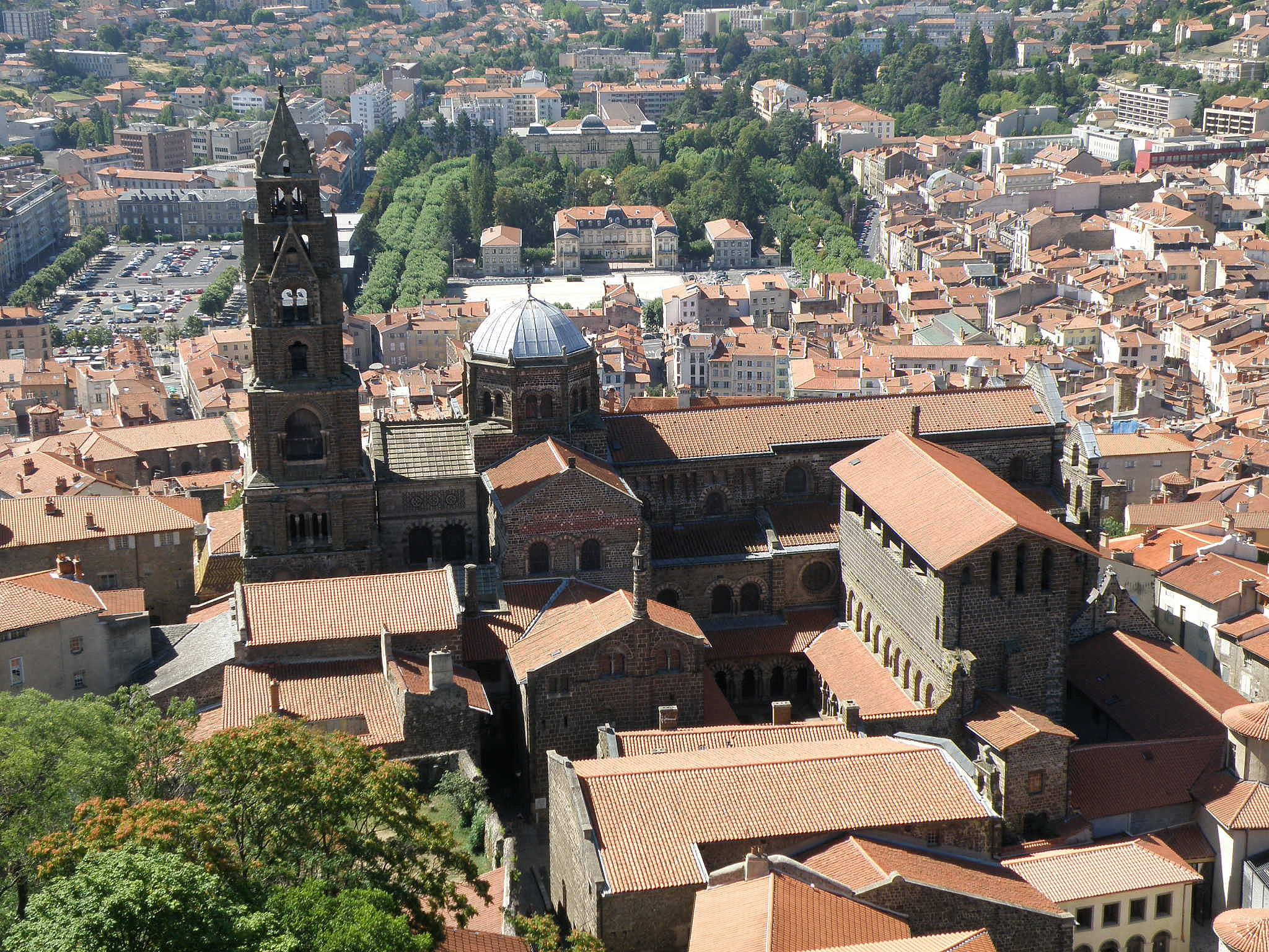 Le Puy-en-Velay (préf. de la Haute-Loire, France), la cathédrale vue du rocher Corneille. Nous regardons vers le sud ; le pôle oriental de l’église est donc à gauche. Le cliché permet de bien distinguer les différentes parties qui composent l’édifice. Ce sont, de gauche à droite : le clocher (hauteur 56m), indépendant du reste de l'église ; le chœur et la coupole octogonale sur la croisée du transept ; la nef avec le pignon de la façade occidentale à droite ; plus près de nous, prolongeant le bras nord du transept : la salle capitulaire, et devant celle-ci, le bâtiment des Clergeons, dont le pignon est surmonté d'une cheminée romane rappelant la forme d'un minaret ; à sa droite : le cloître ; plus à droite encore, la forme massive du bâtiment des Mâchicoulis ; à gauche, devant le clocher : le baptistère Saint-Jean ; plus proche de nous encore, au centre : la chapelle des Pénitents. Au second plan, derrière la coupole de croisée, la préfecture de la Haute-Loire, devant laquelle s’étend la place du Breuil ; derrière : le jardin Henri-Vinay, et, bordant celui-ci au sud, le musée Crozatier. La vaste place au second plan à gauche est la place J. Michelet.